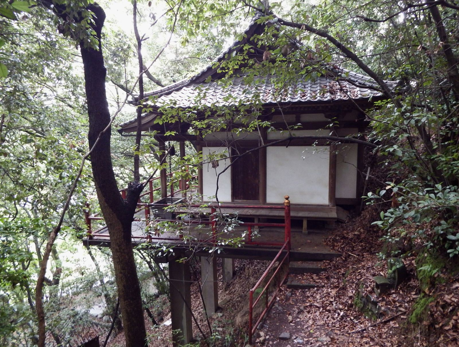 石手寺の観音堂